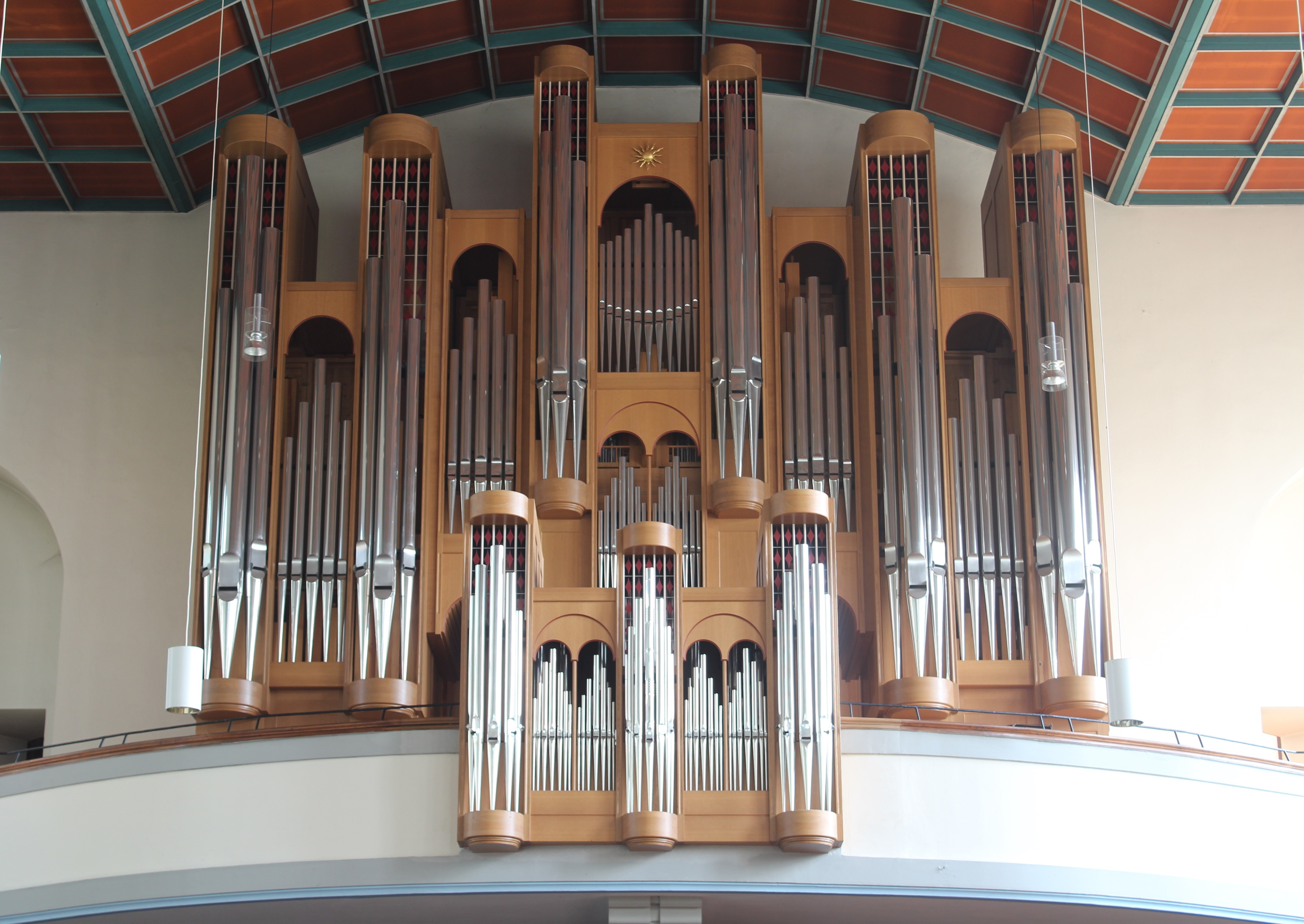 Hey-Orgel der evangelischen Christuskirche zu Oberhausen, Stadtbezirk Alt Oberhausen